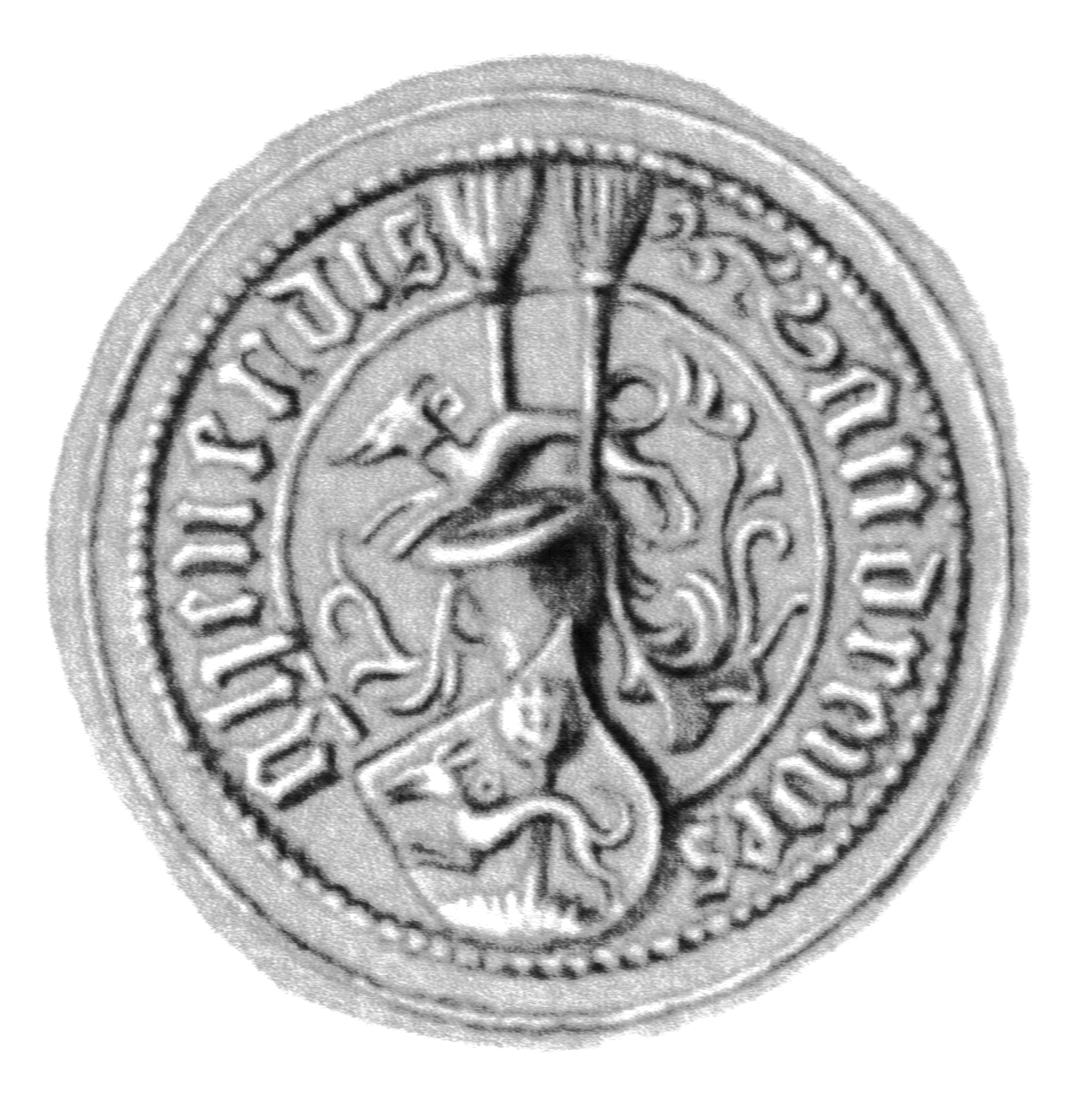 Siegel des Ratsmannes Andreas_(Andrewes)_Ghewerdi(e)s. Das Siegel stammt aus der Zeit um 1457. Siehe Emil Ferdinand Fehling: Lübeckische Ratslinie, Nr. 529 (Andreas Geverdes).